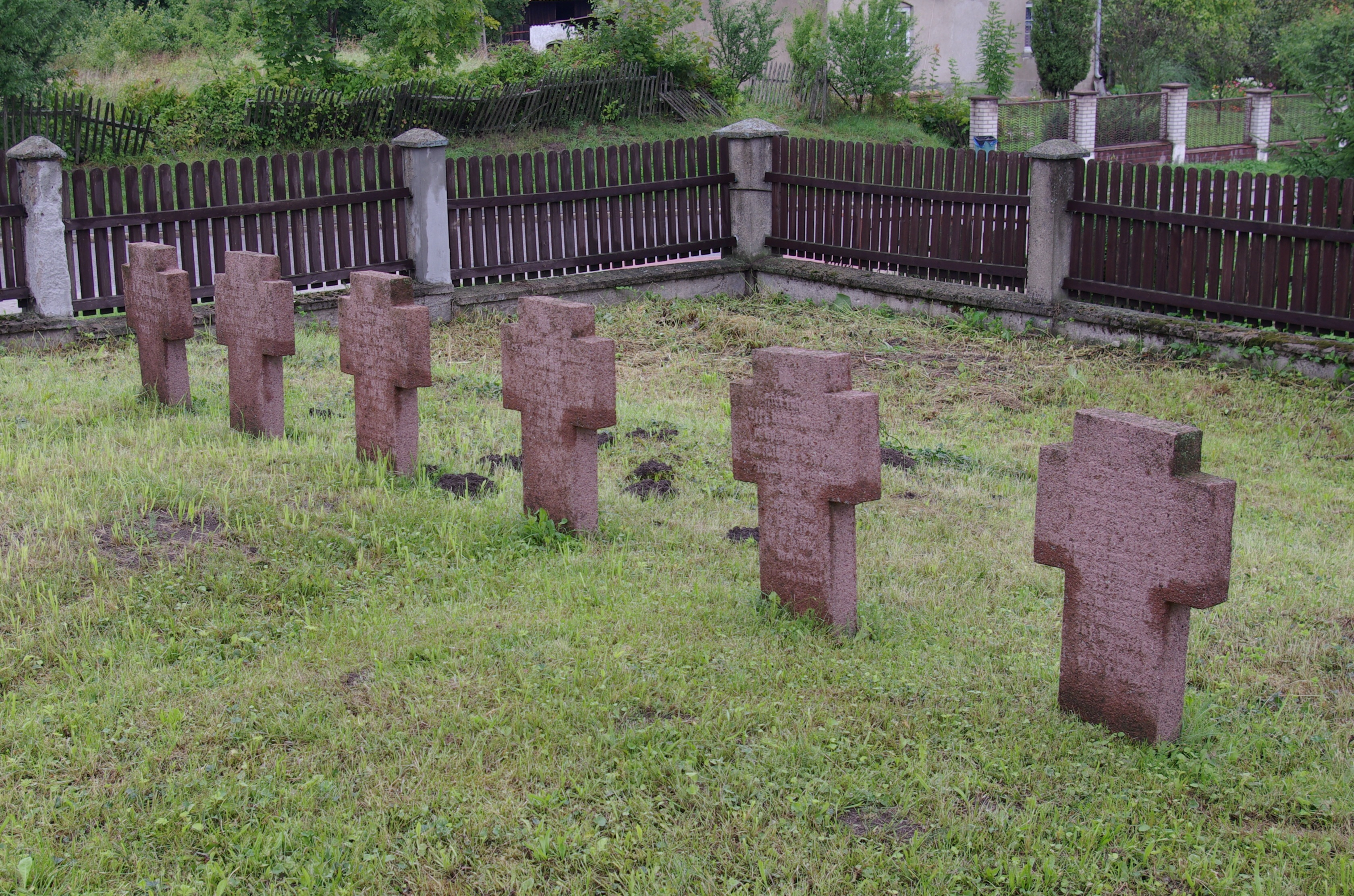 Radzieje